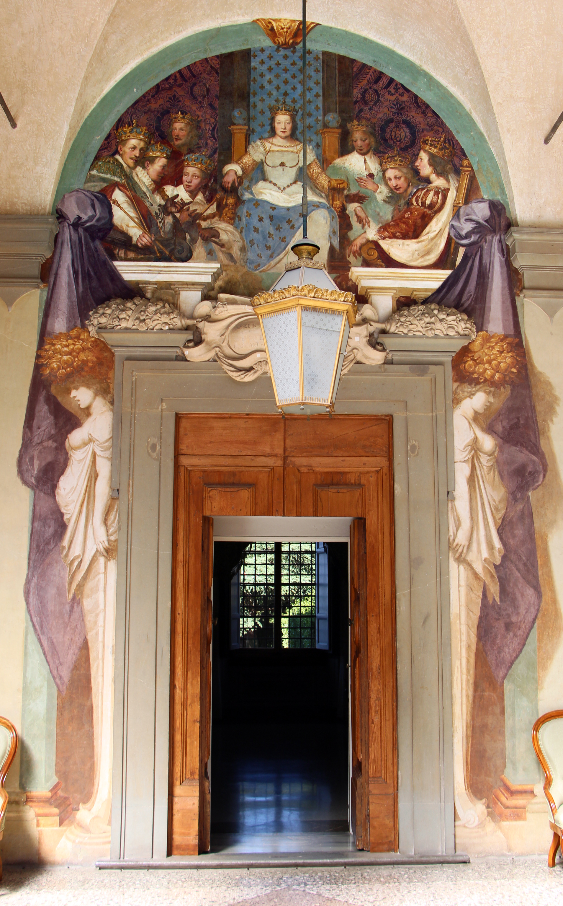 Villa medicea della Petraia - MIBAC The making of this document was supported by Wikimedia CH. (Submit your project!) For all the files concerned, please see the category Supported by Wikimedia CH. This is a photo of a monument which is part of cultural heritage of Italy.